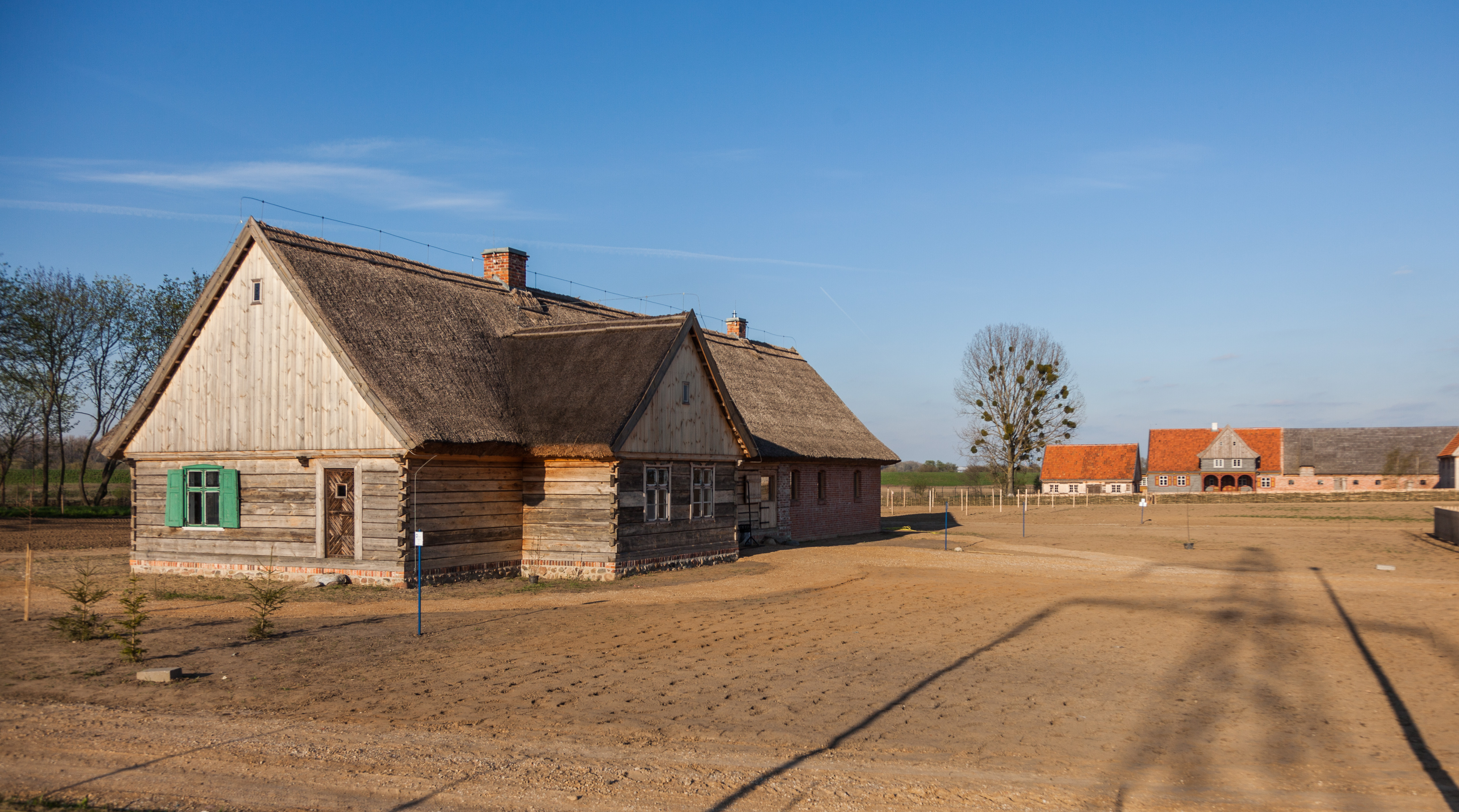 Olęderski Park Etnograficzny w Wielkiej Nieszawce k. Torunia w trakcie organizacji - stan z kwietnia 2017 r.